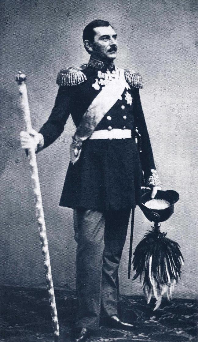 Johan Mauritz Nordenstam kenraalinunivormussa ja maamarsalkan sauvan kanssa.